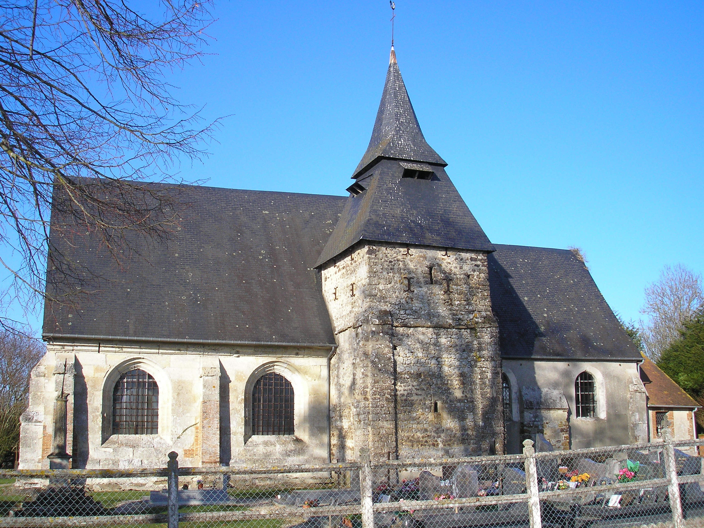 Cordebugle (Normandie, France). L'église Saint-Pierre.